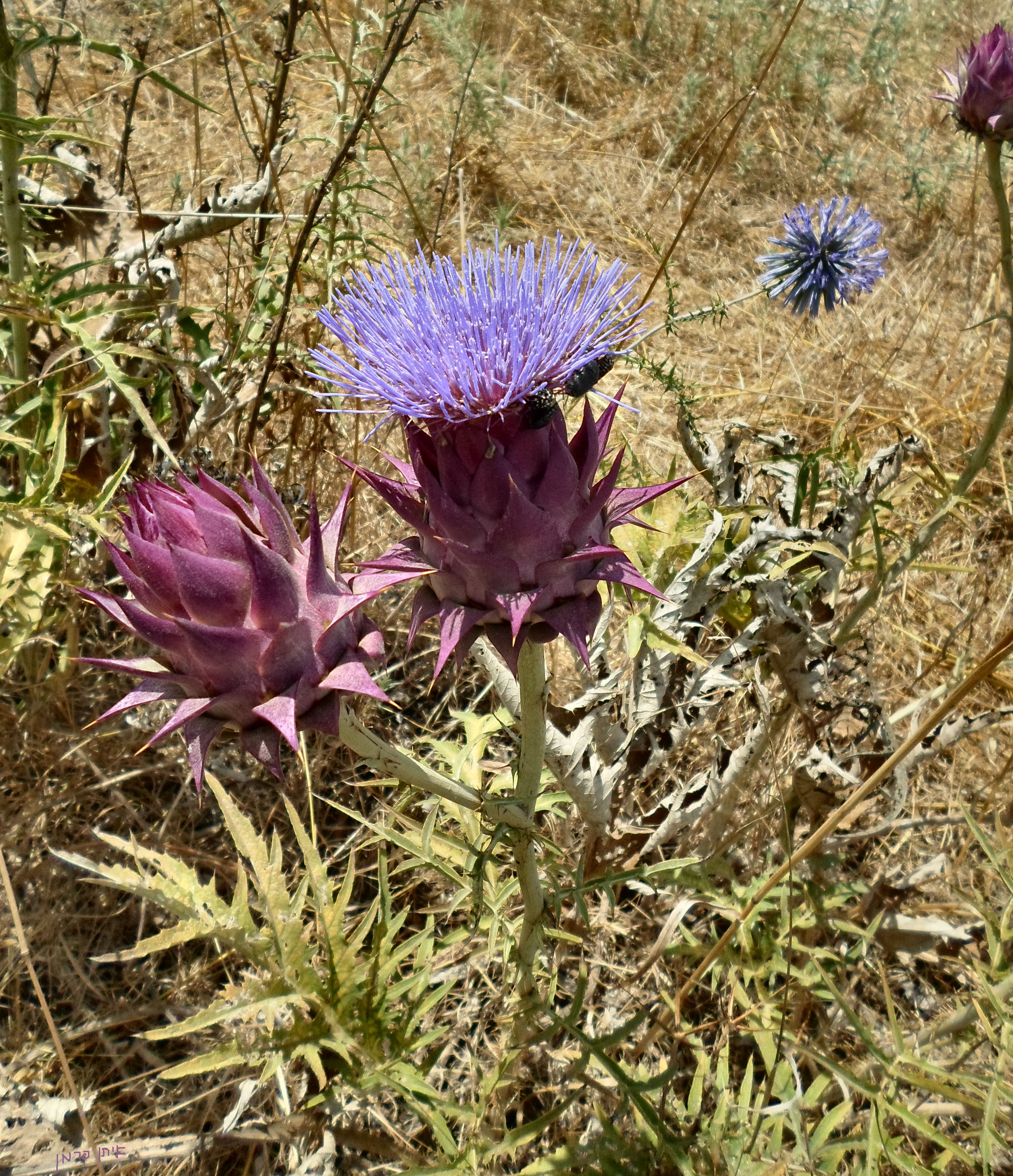 Cynara syriaca קנרס סורי - נחל סנין